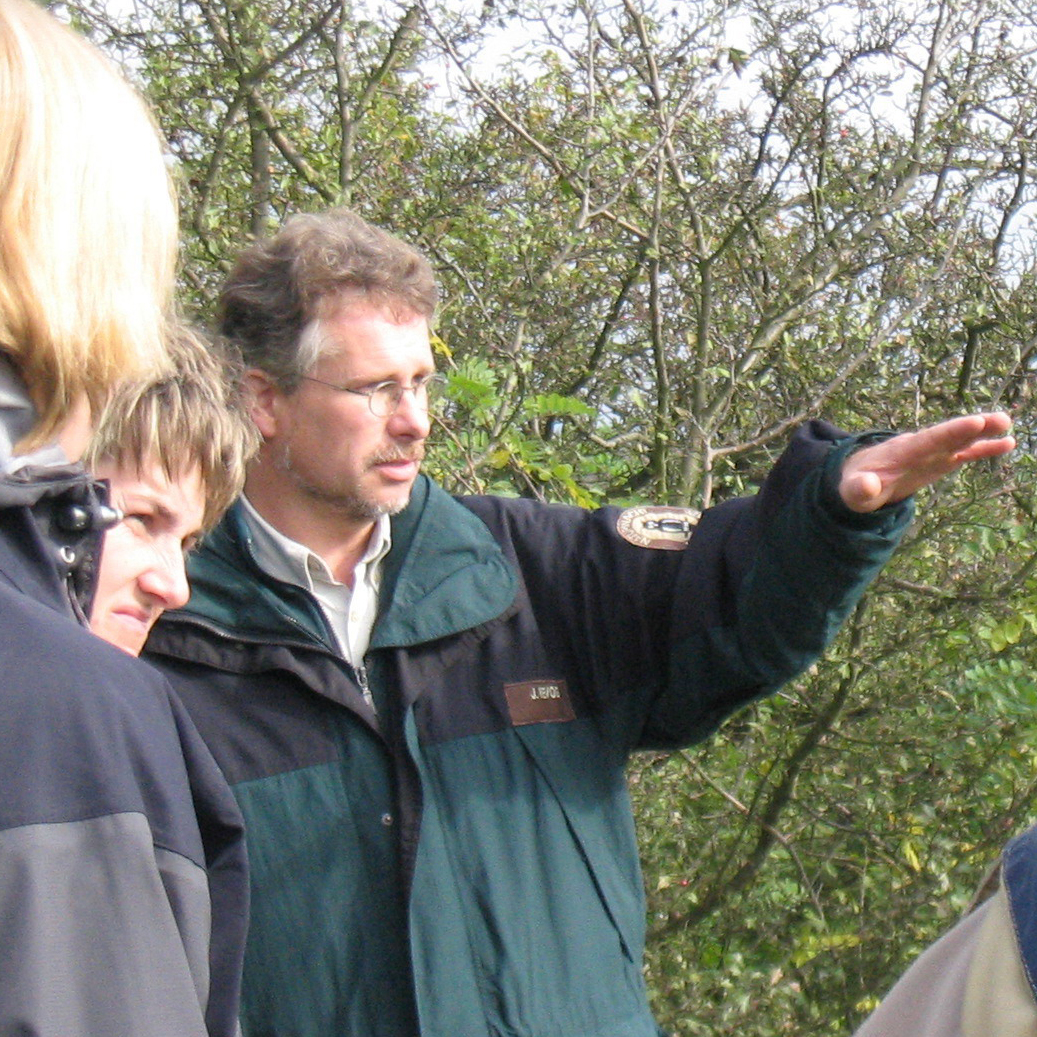 Interpretive Talk